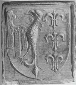 Herb Bielska na kaflu z II poł. XV w. Ze zbiorów Muzeum Historycznego Miasta Krakowa.